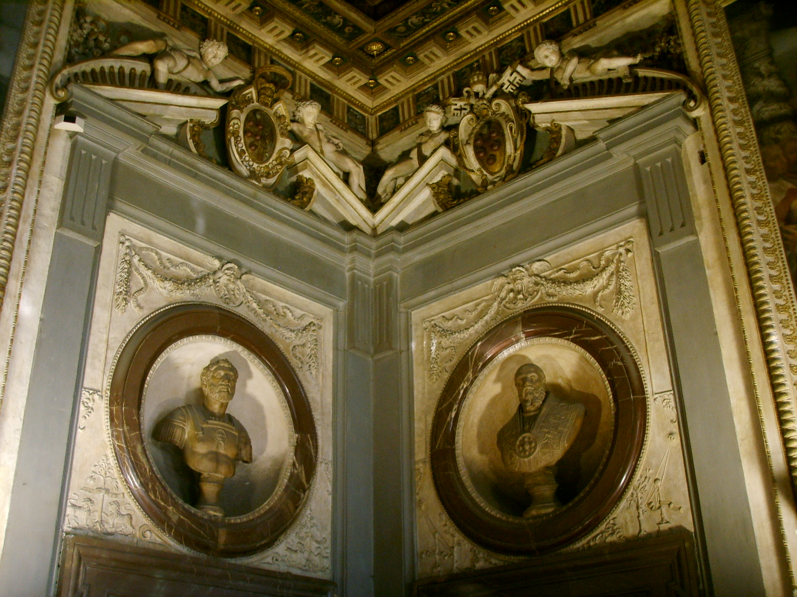 Sala di leone X, Gino Lorenzi, busto di Clemente VII e Alfonso Lombardi, busto di Lorenzo duca di Urbino